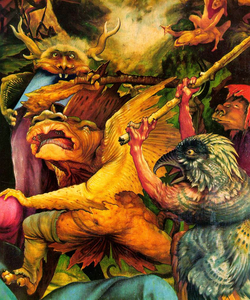 Die Versuchung des hl. Antonius, Ausschnitt aus dem Isenheimer Altar